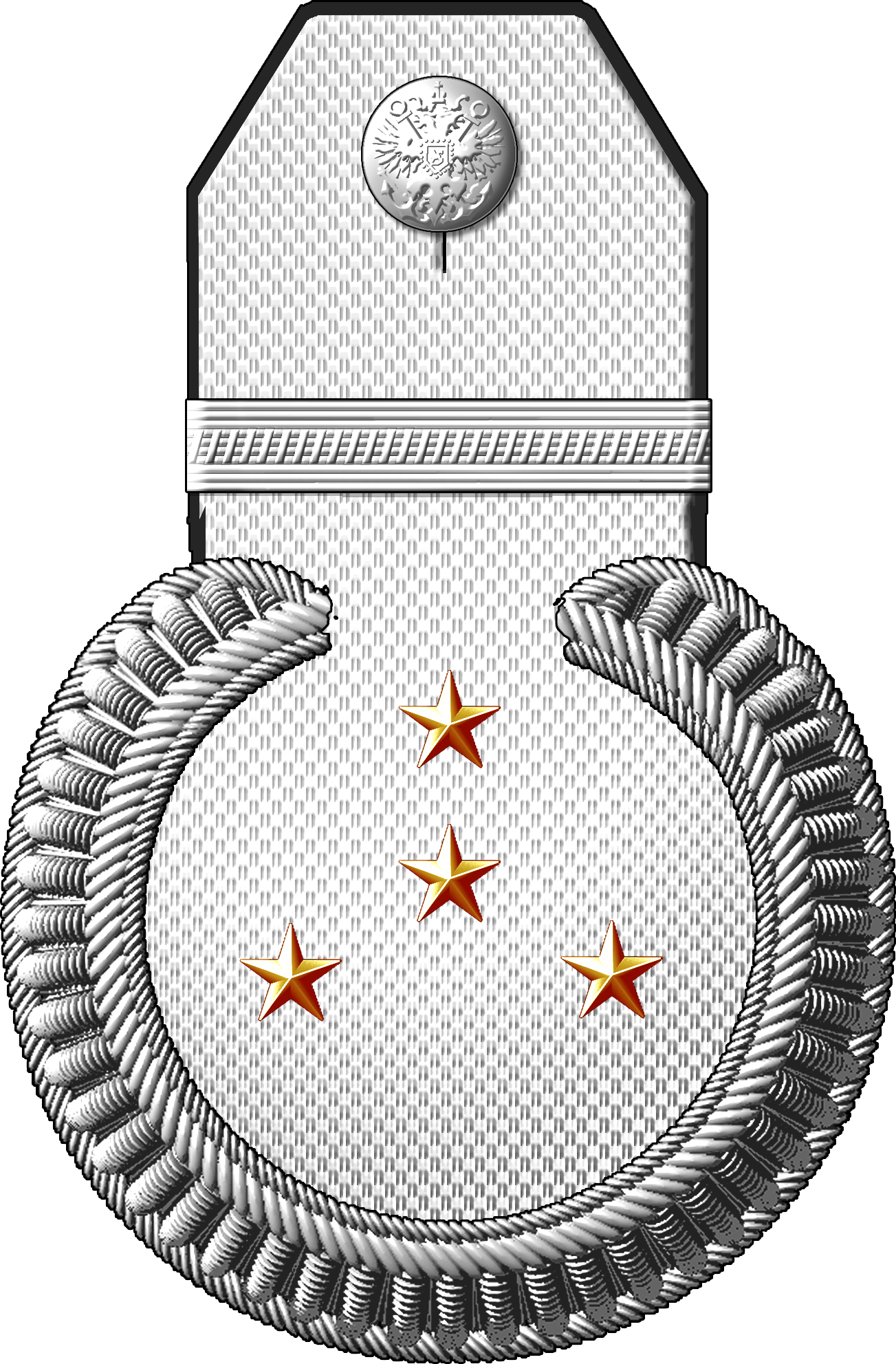 Российская империя; Российский Императорский флот. Корпус инженер-механиков флота; Форма обр. 1905 г. (1905—1913 гг.) Эполет классного чина «Штабс-капитан корпуса инженер-механиков флота». Первичный источник исходного изображения: Полное собрание законов Российской Империи, собрание 3, от 31 декабря 1904 г. № 25597 Приказ по Морскому ведомству от 8 января 1905 г. № 6. Офицеры упразднённого Корпуса флотских штурманов (1904—1917 гг.) Эполет классного чина «Штабс-капитан Корпуса флотских штурманов». Первичный источник исходного изображения: Полное собрание законов Российской Империи, собрание 3, от 31 декабря 1904 г. № 25597.